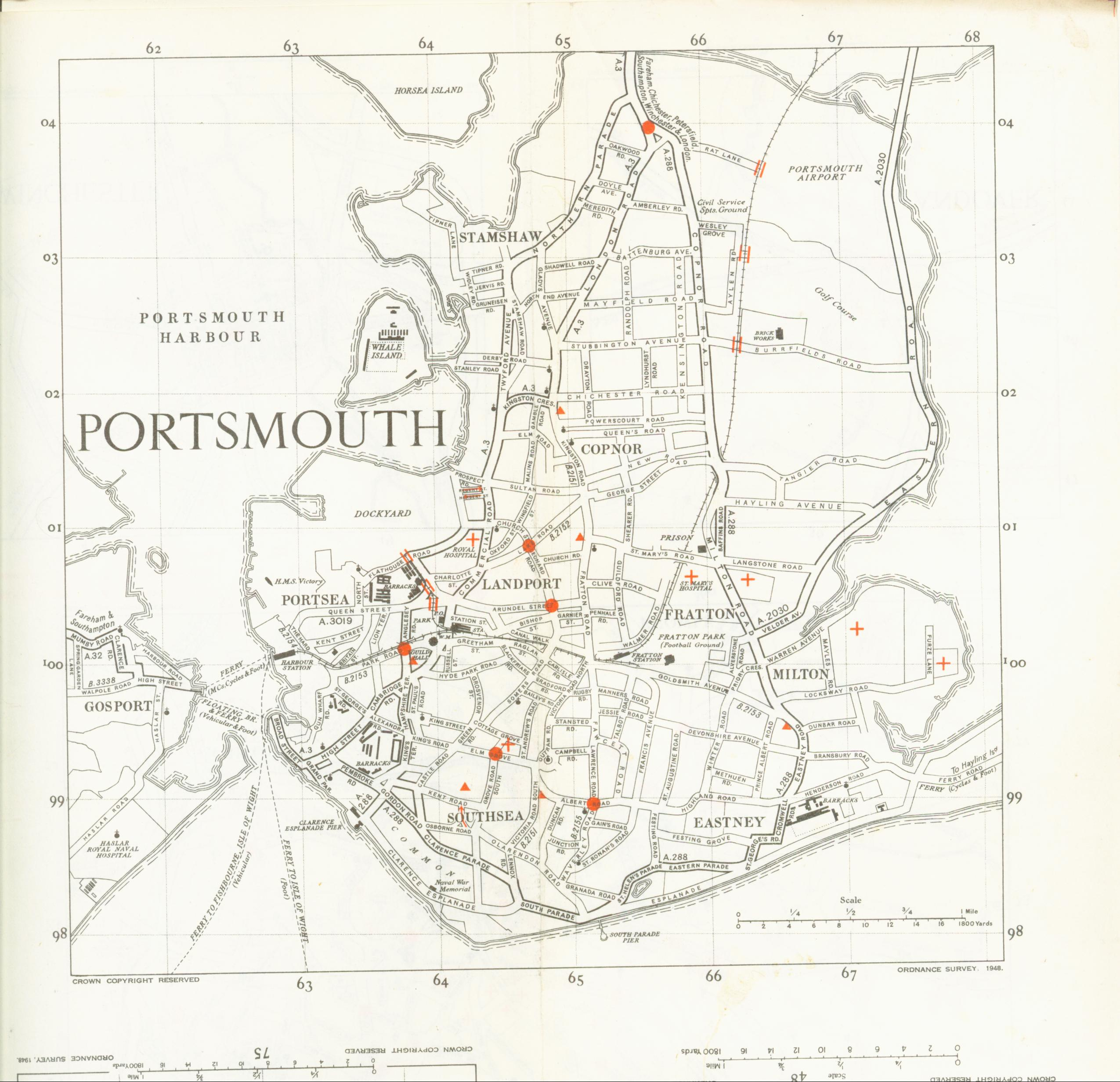 OS map from 1948